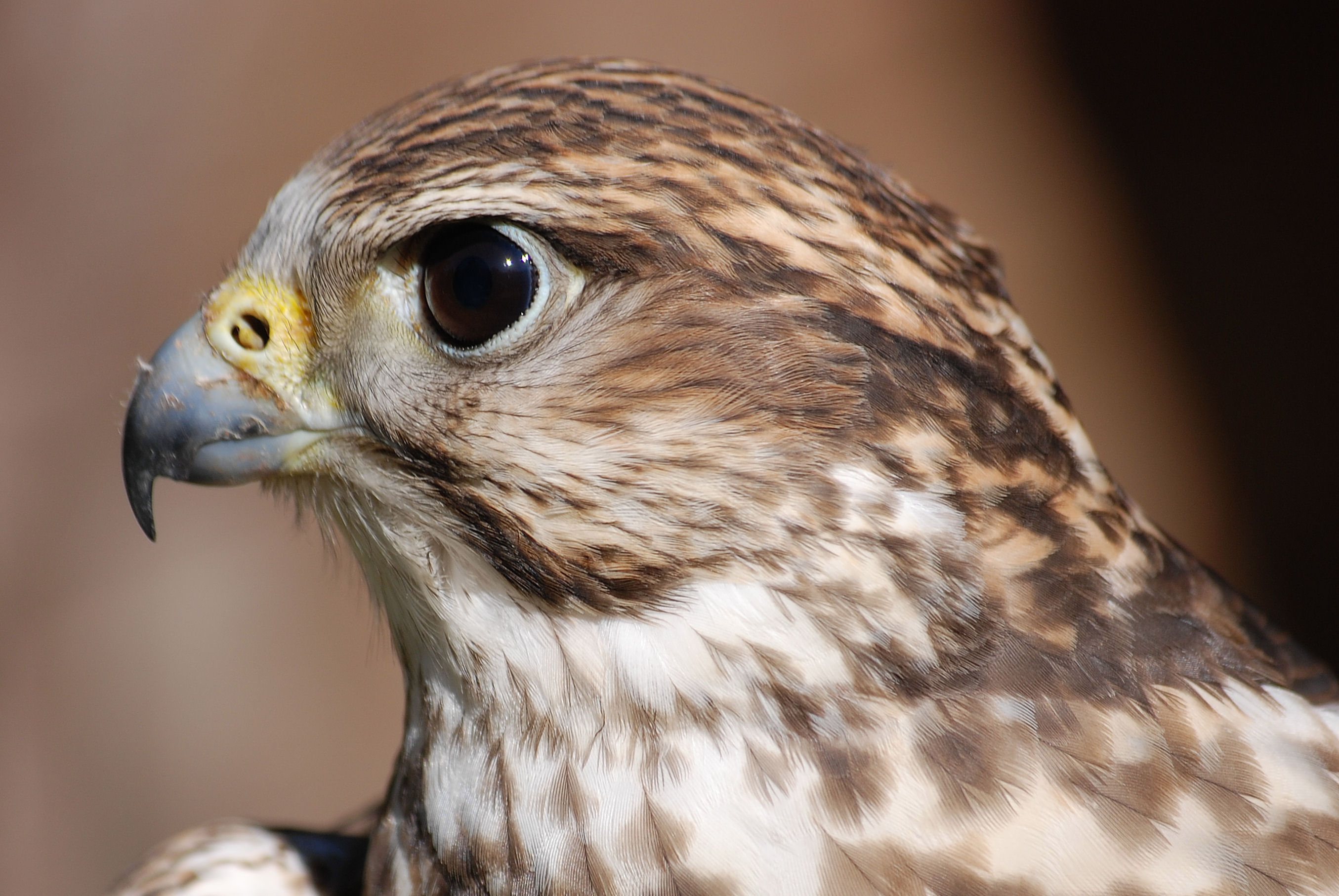 Falco cherrug, portrait